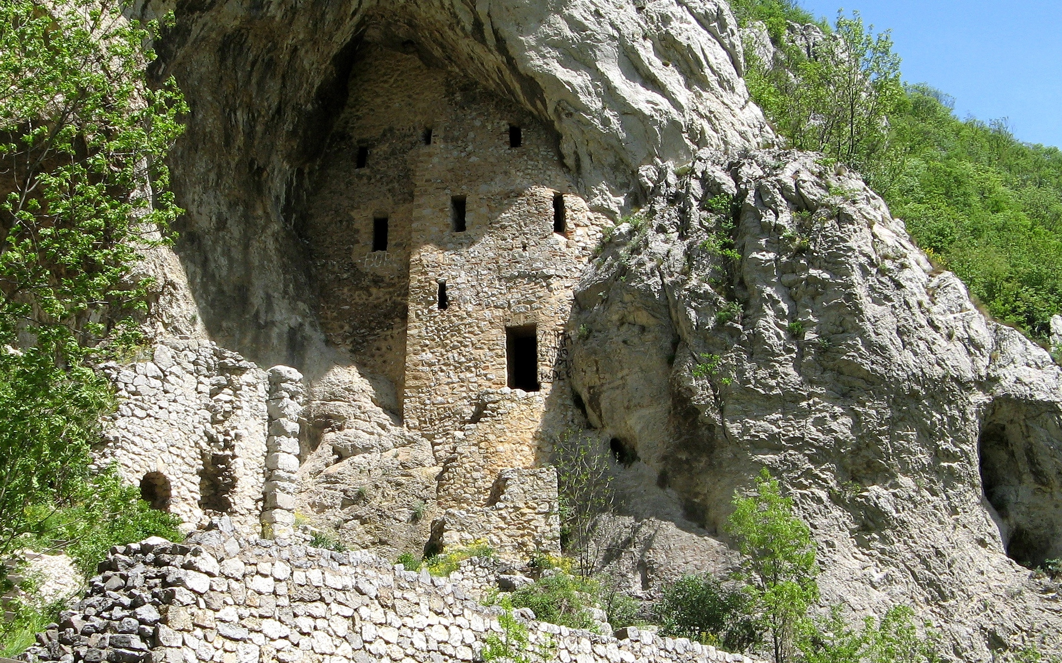 Manastir Blagovestenje, Ždrelo, Petrovac na Mlavi